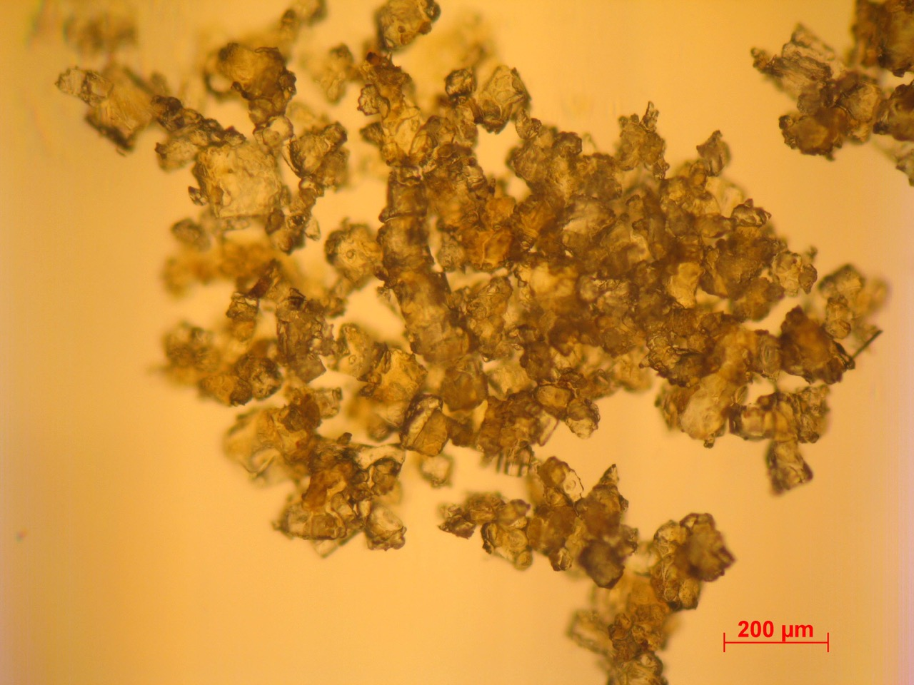 Фульвовая кислота под электронным микроскопом, 200нм